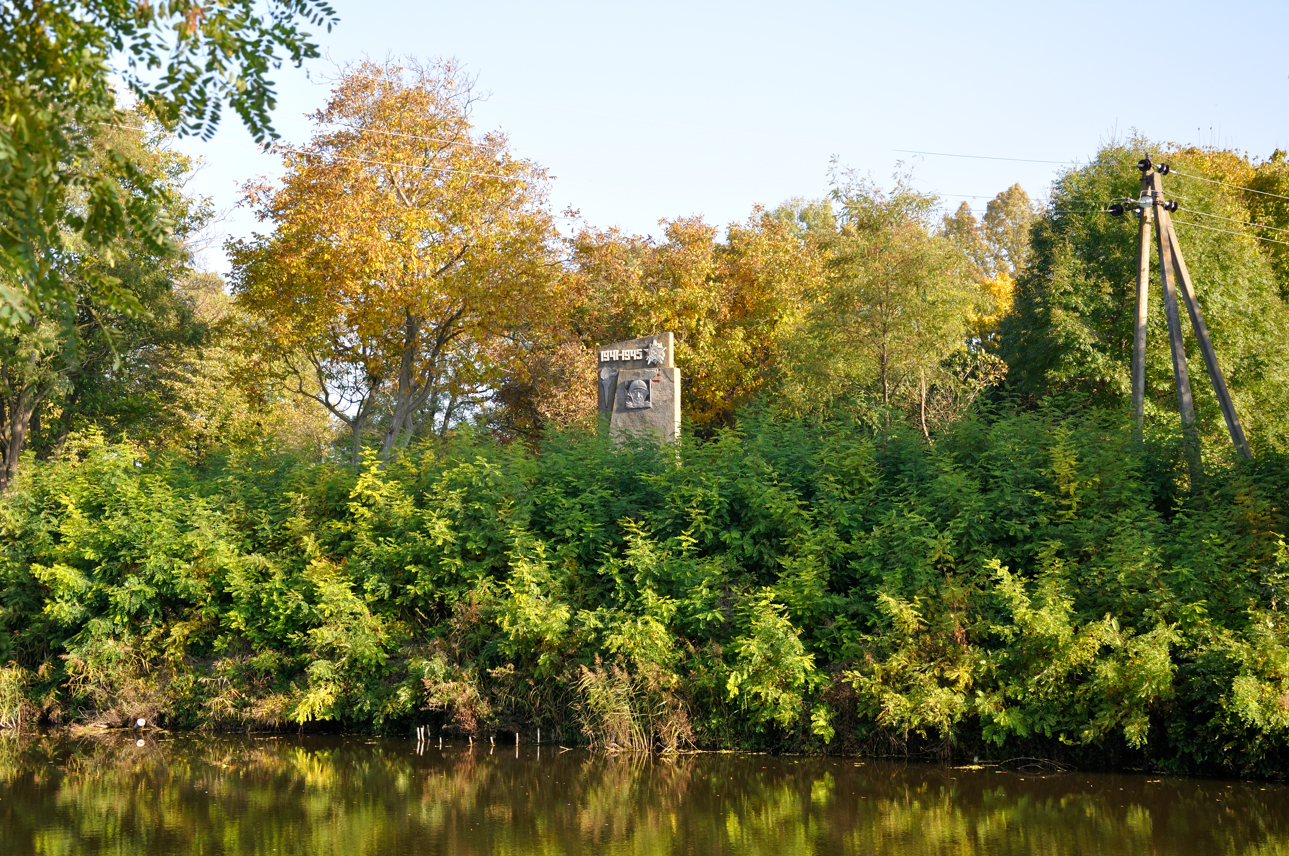 Пам'ятник воїнам-односельчанам, с. Мирне